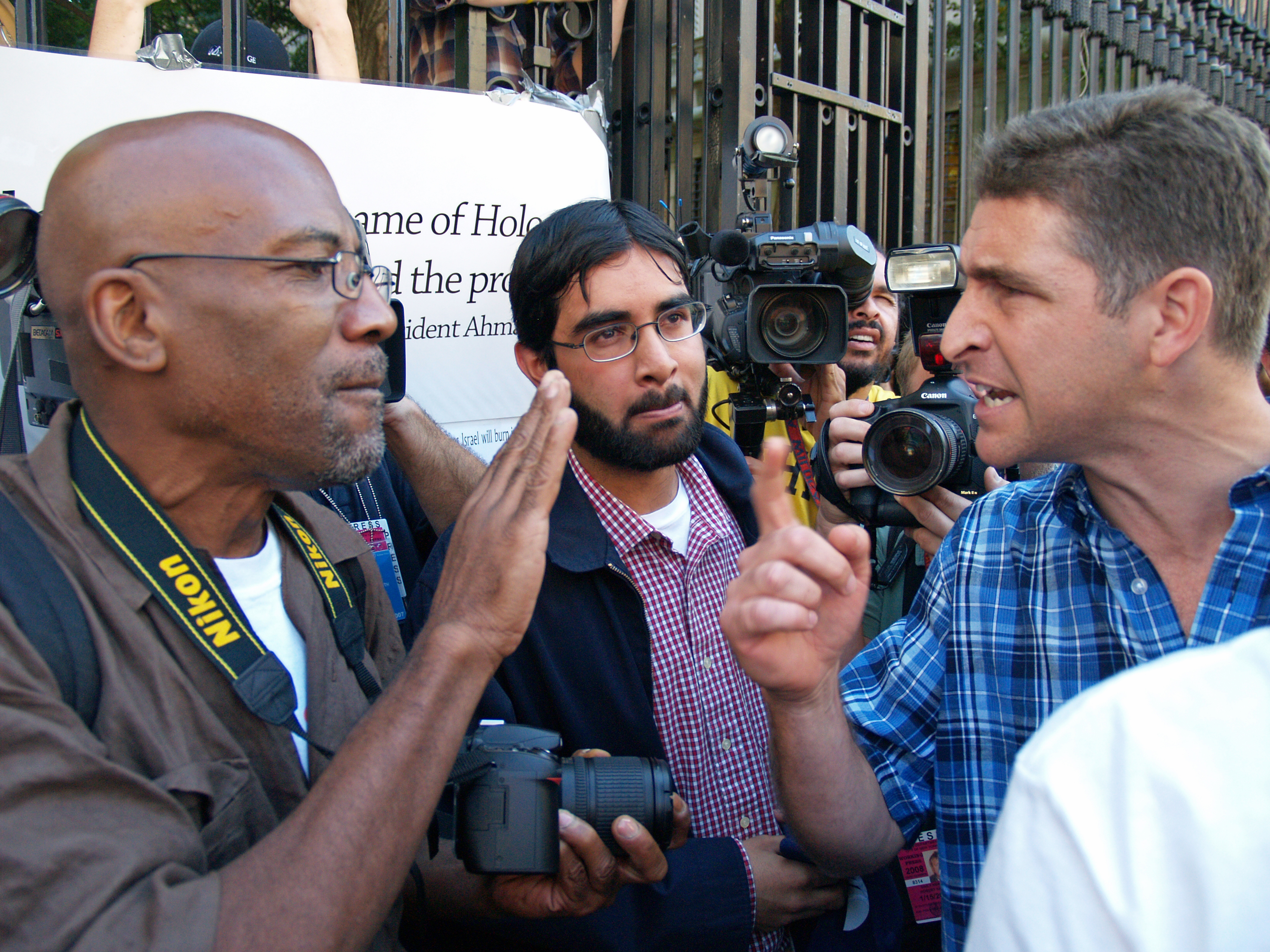 Mahmoud Ahmadinejad at Columbia